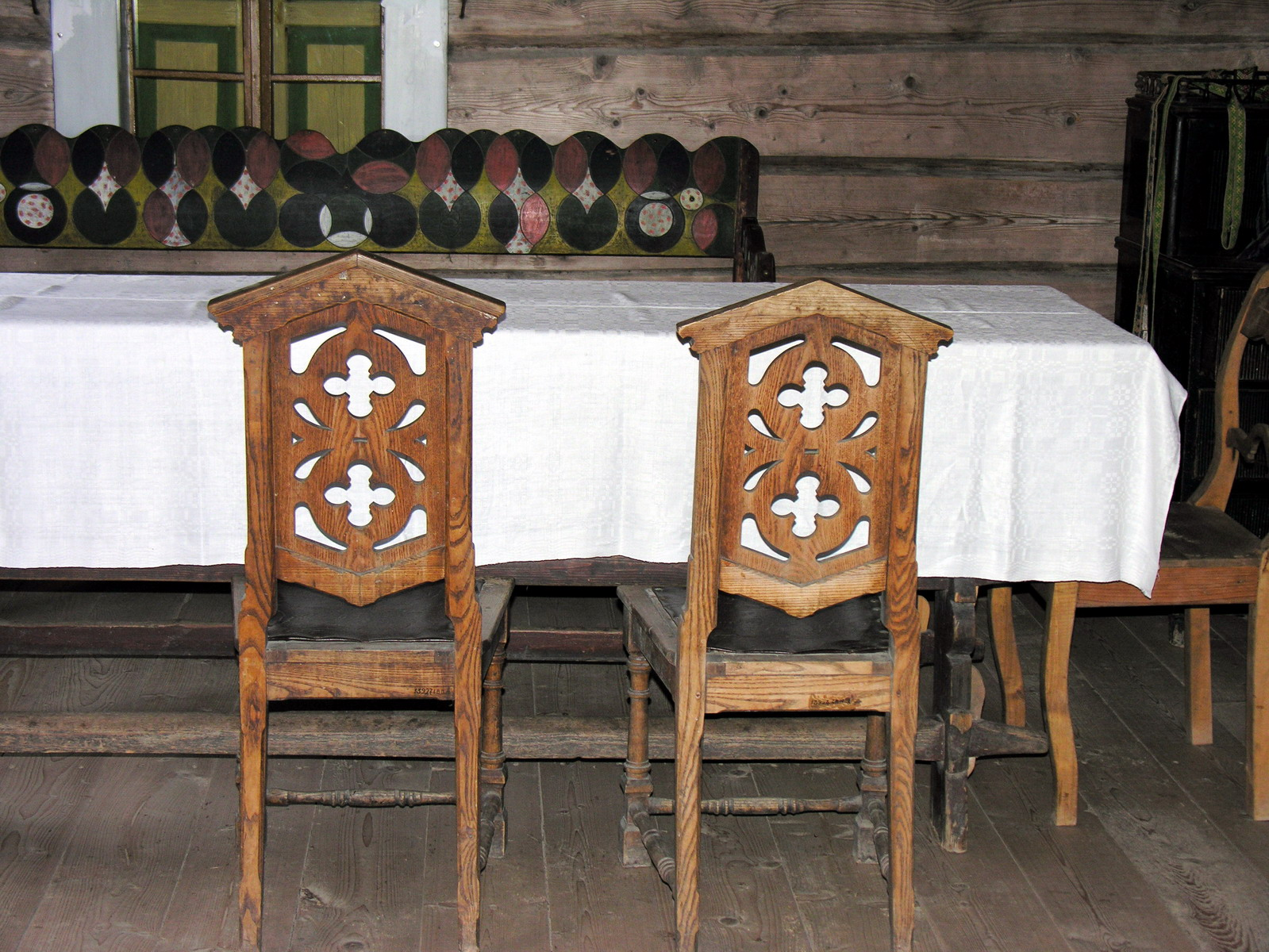 Kėdė 2007-04-21, Lietuva